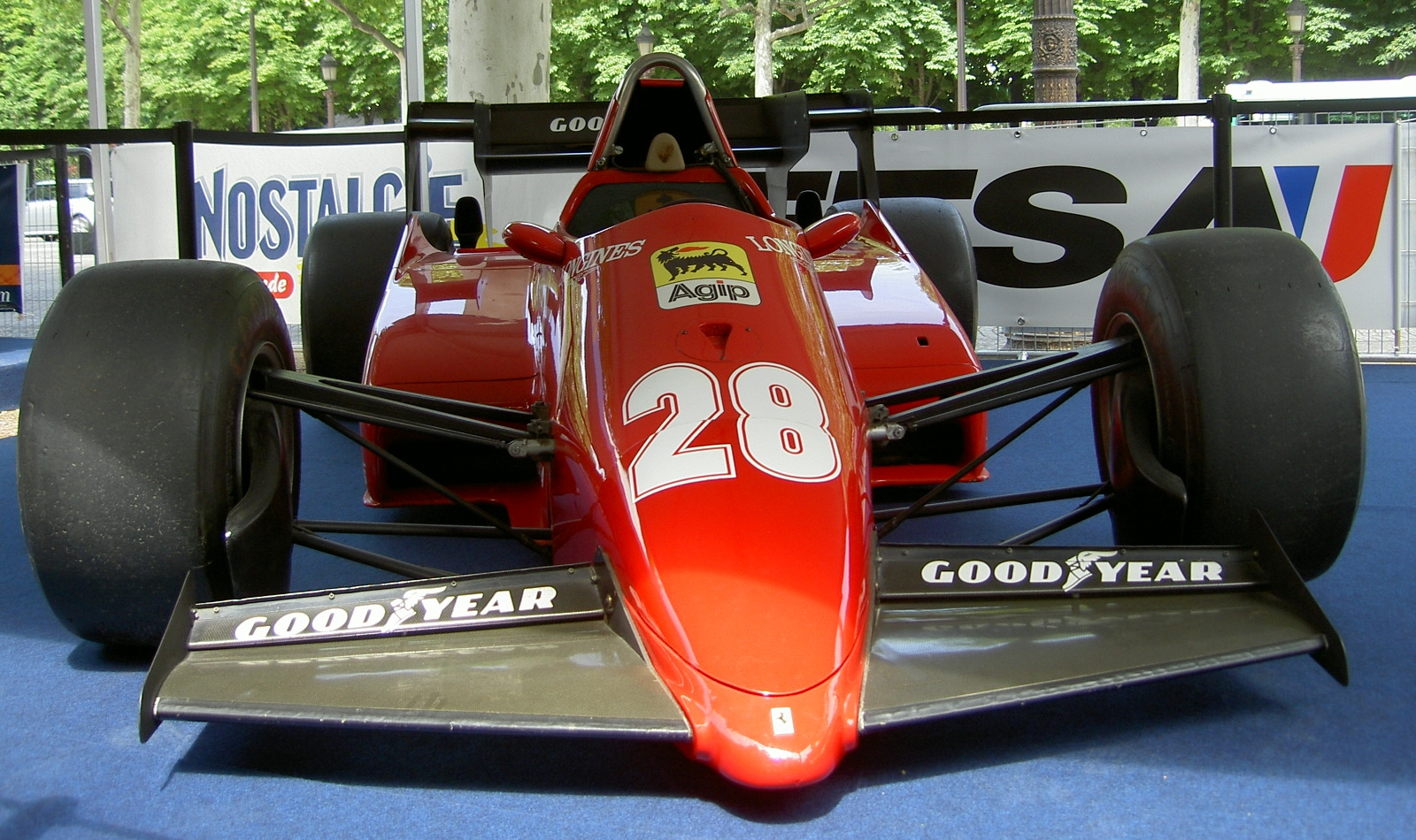 Ferrari 123 C3 - René Arnoux (france)